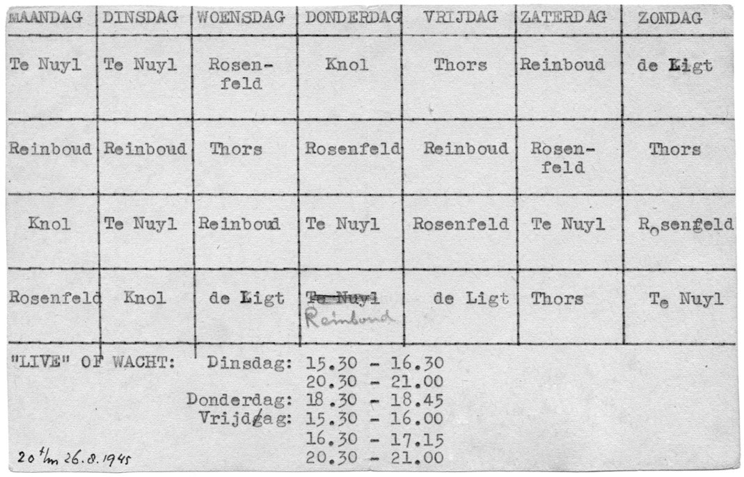 Uit archief Joop Reinboud.